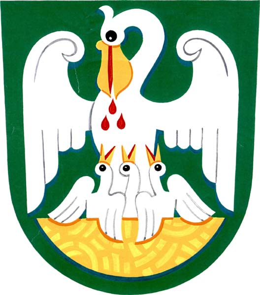 Česky: znak obce Vilémov